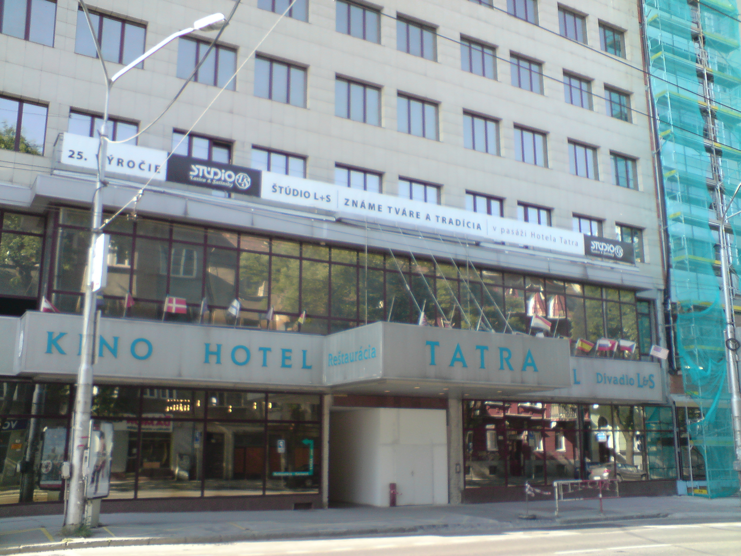 Námestie 1. mája, Bratislava